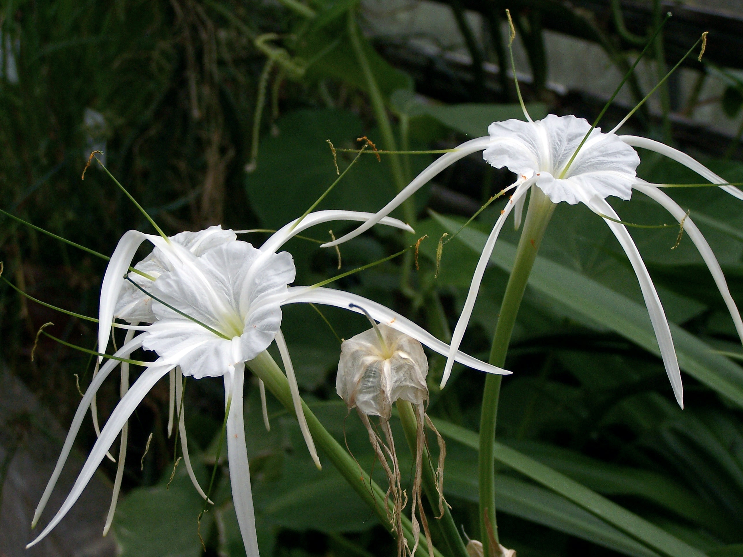 Hymenocallis littoralis 17 juin 2006 Vieux jardin botanique de Göttingen